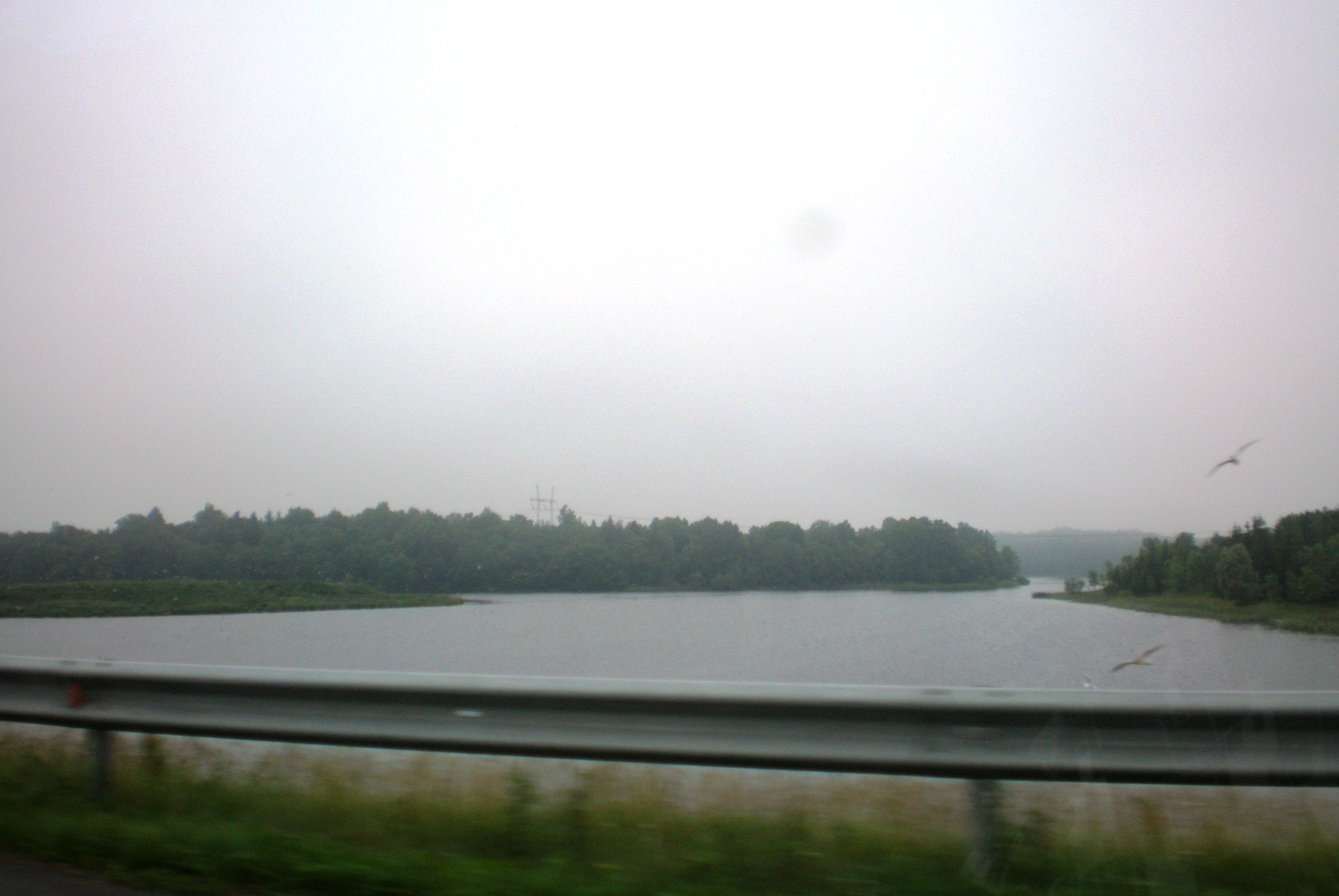 Striūnos tvenkinys, Kauno raj.